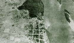 Vista aérea de Boa Vista, Roraima realizada por Hamilton Rice, 1924.